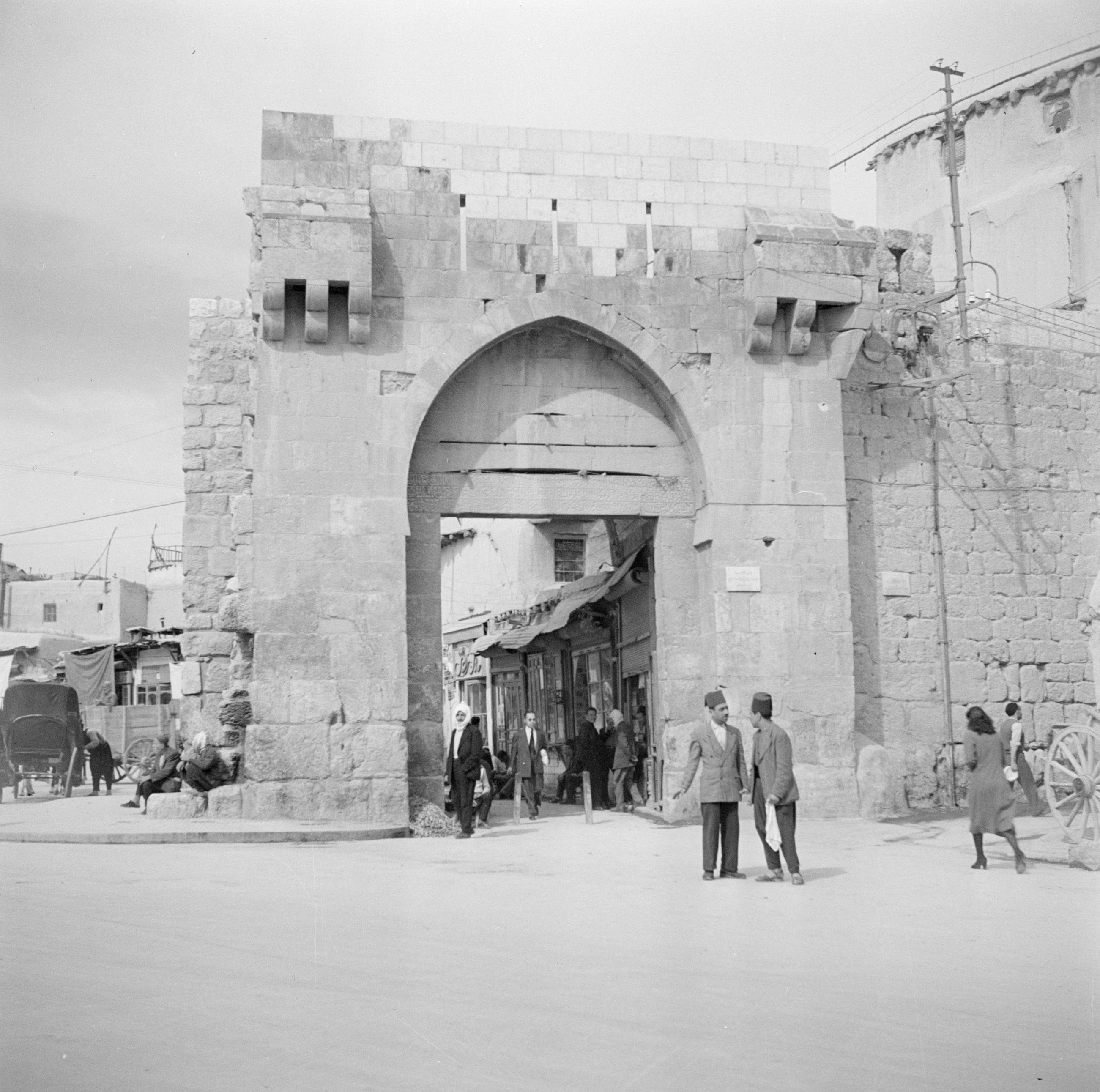 Collectie / Archief : Fotocollectie Van de Poll Reportage / Serie : Midden-Oosten 1950-1955: Syrië - Damascus Beschrijving : De poort Bab Tuma in de stadsmuur Datum : 1950 Locatie : Damascus, Syrië Trefwoorden : poorten, stadsmuren, straatbeelden Fotograaf : Poll, Willem van de Auteursrechthebbende : Nationaal Archief Materiaalsoort : Negatief (zwart/wit) Nummer archiefinventaris : bekijk toegang 2.24.14.02 Bestanddeelnummer : 255-5862